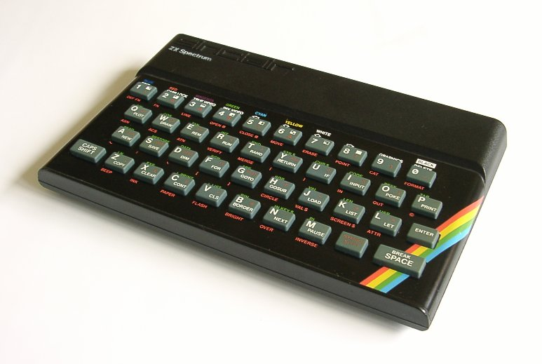 Foto på ZX-Spectrum Fotograf: Daniel Ryde, Skövde 2004-08-31